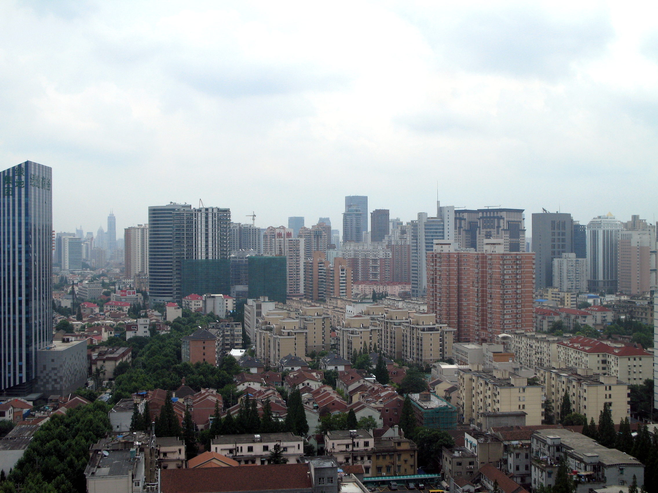 上海長寧區 Shanghai Changning District